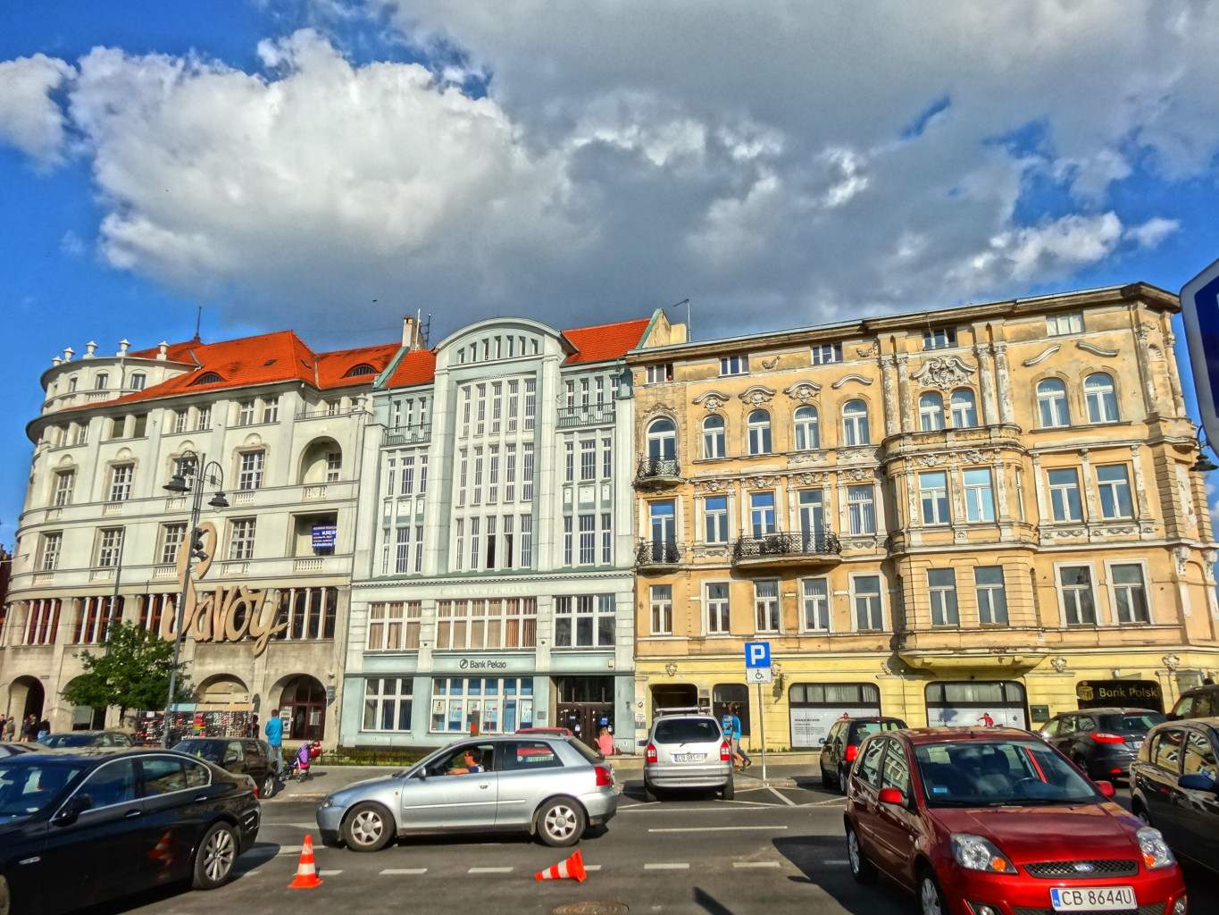 Plac Teatralny w Bydgoszczy